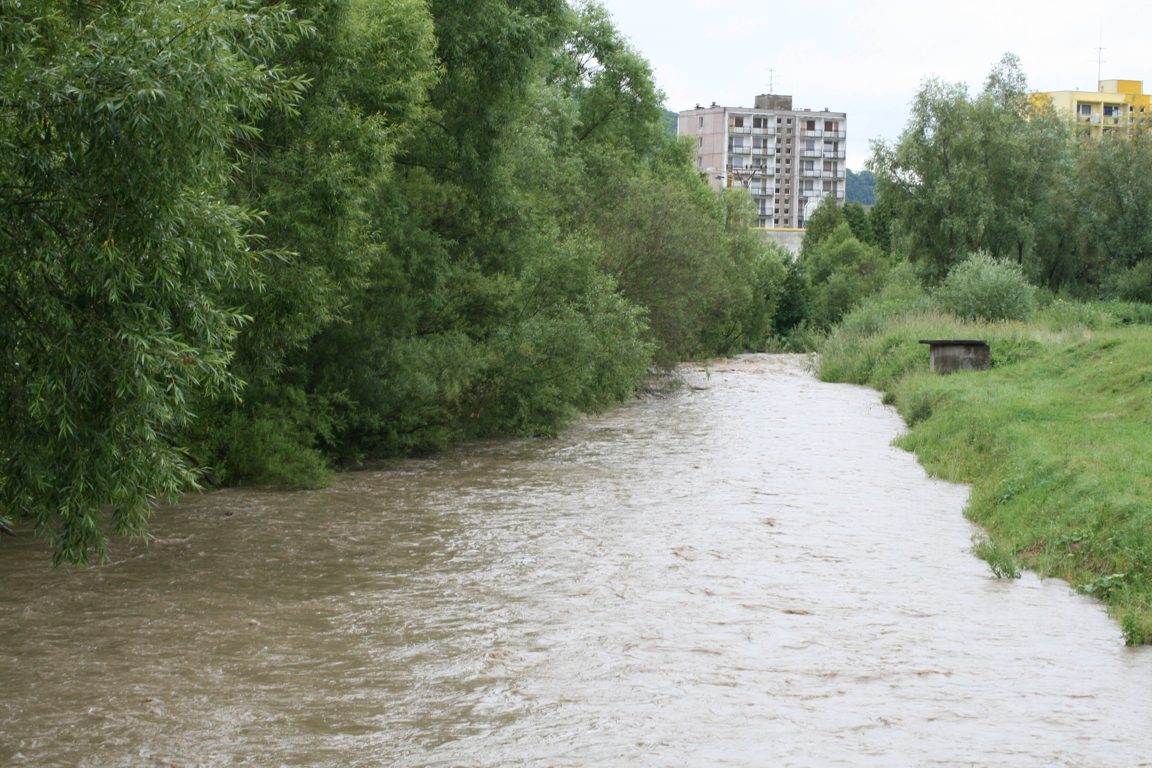 Rozvodnená Ondava počas júnových dažďov na začiatku Svidníka